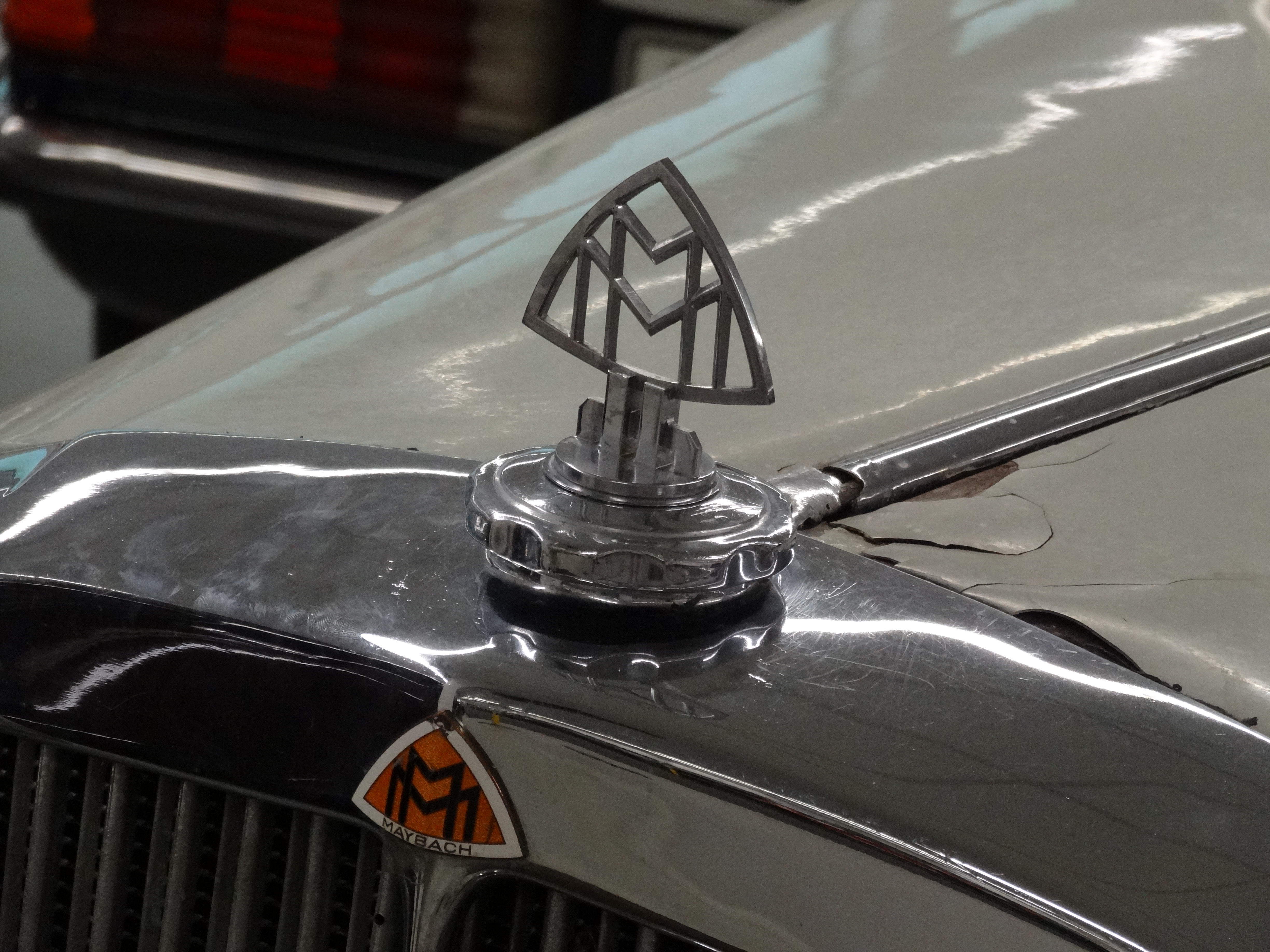 Autosammlung Steim - Schramberg 058 Maybach SW 38 Cabrio